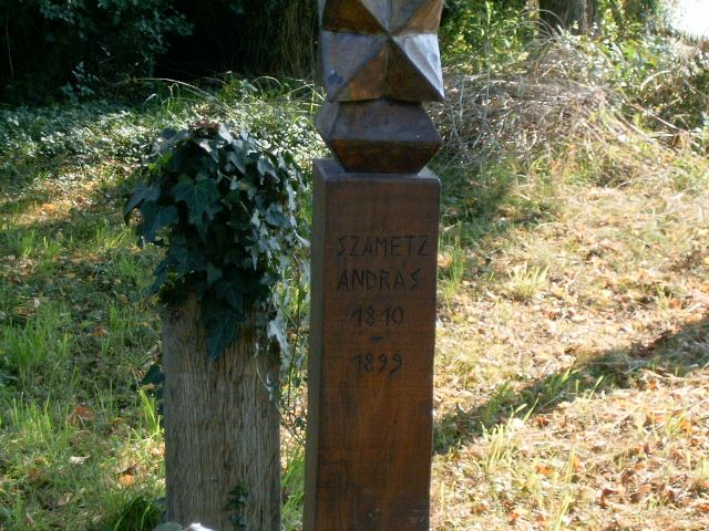 Szametz András kopjafája az unitárius temetőben. Hódmezővásárhely, unitárius temető.